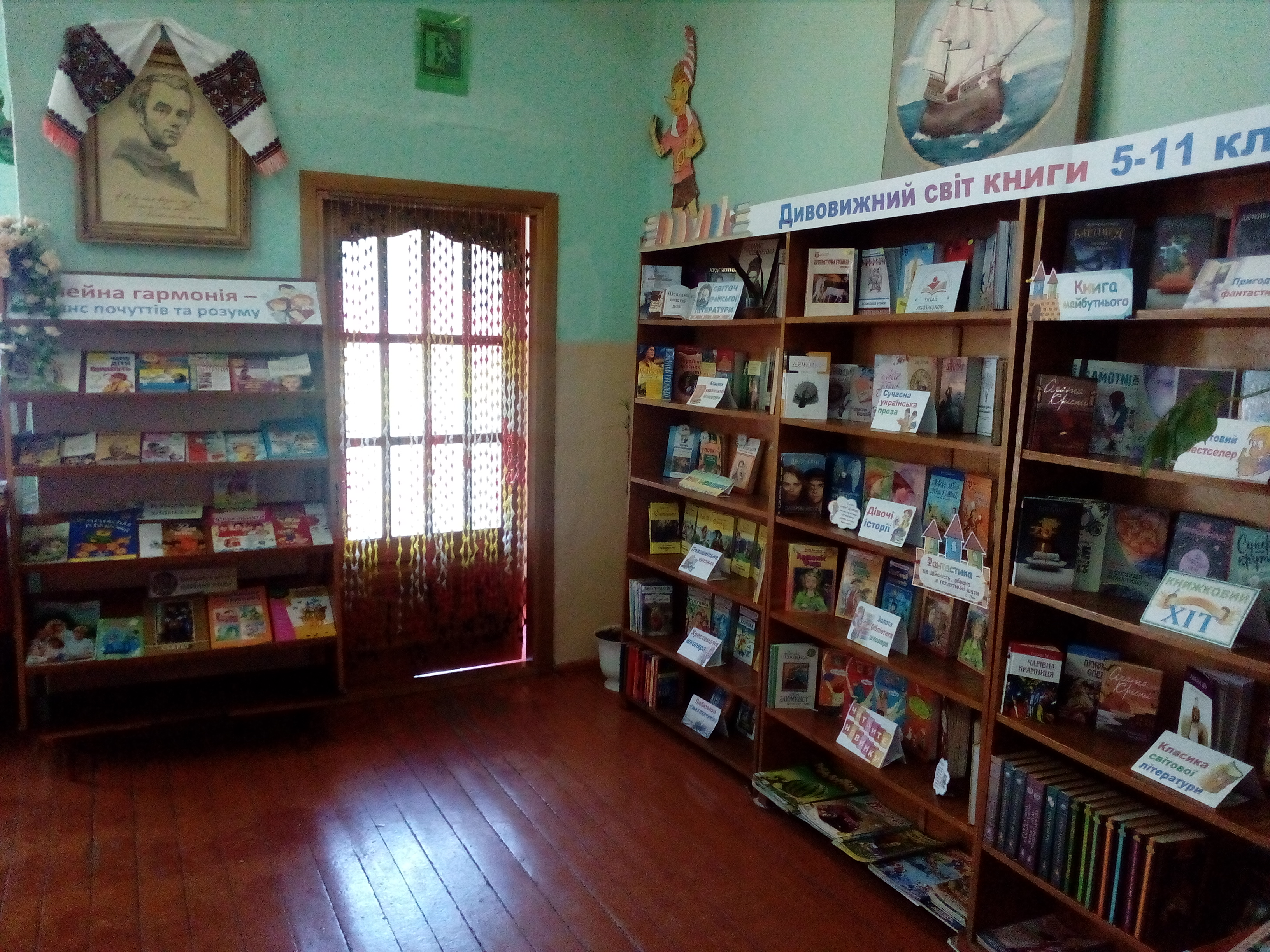 Абонемент для середнього та старшого шкільного віку. Бібліотека-філія №14. Хмельницька міська ЦБС. 2019 рік.